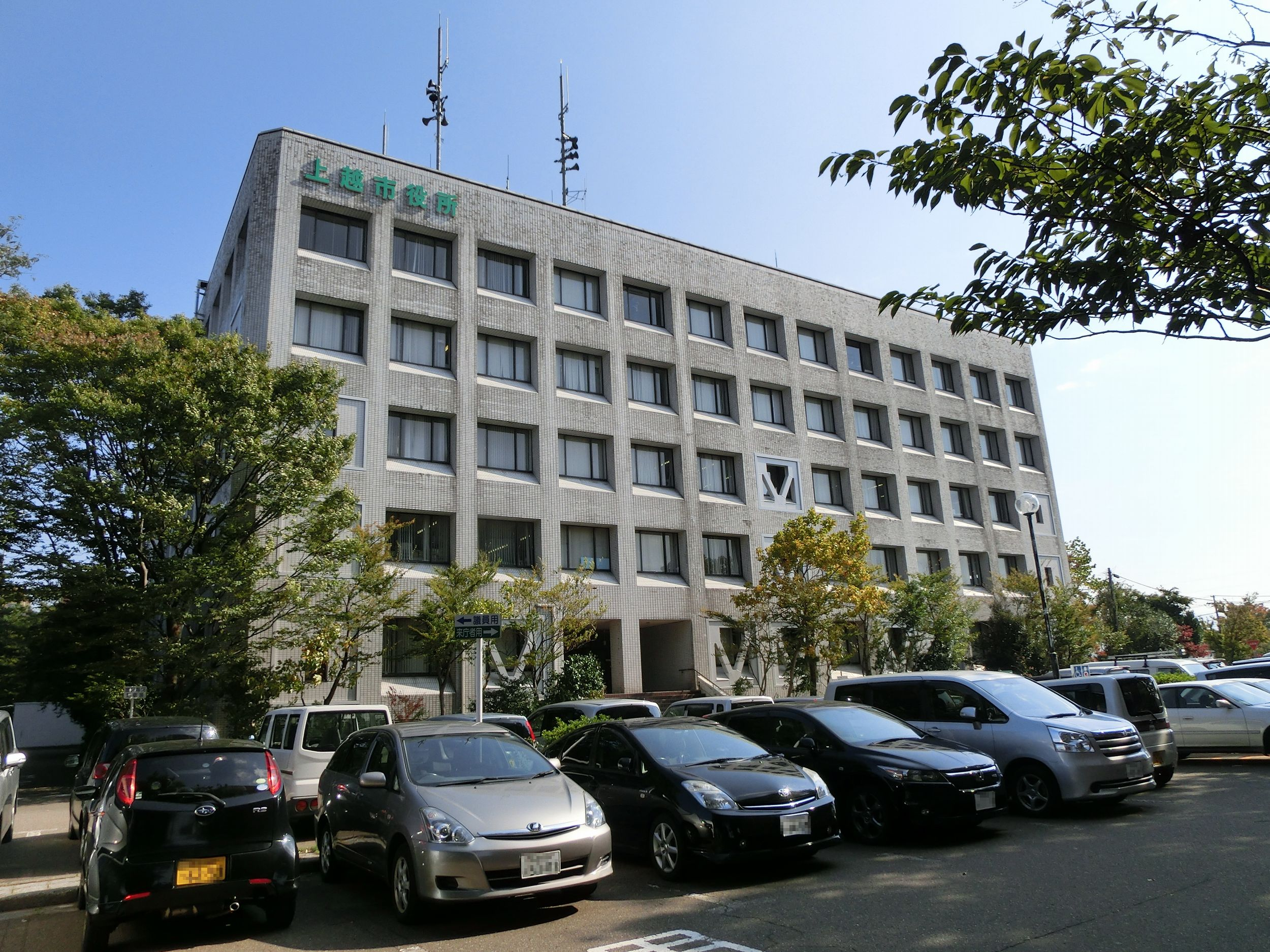 上越市役所